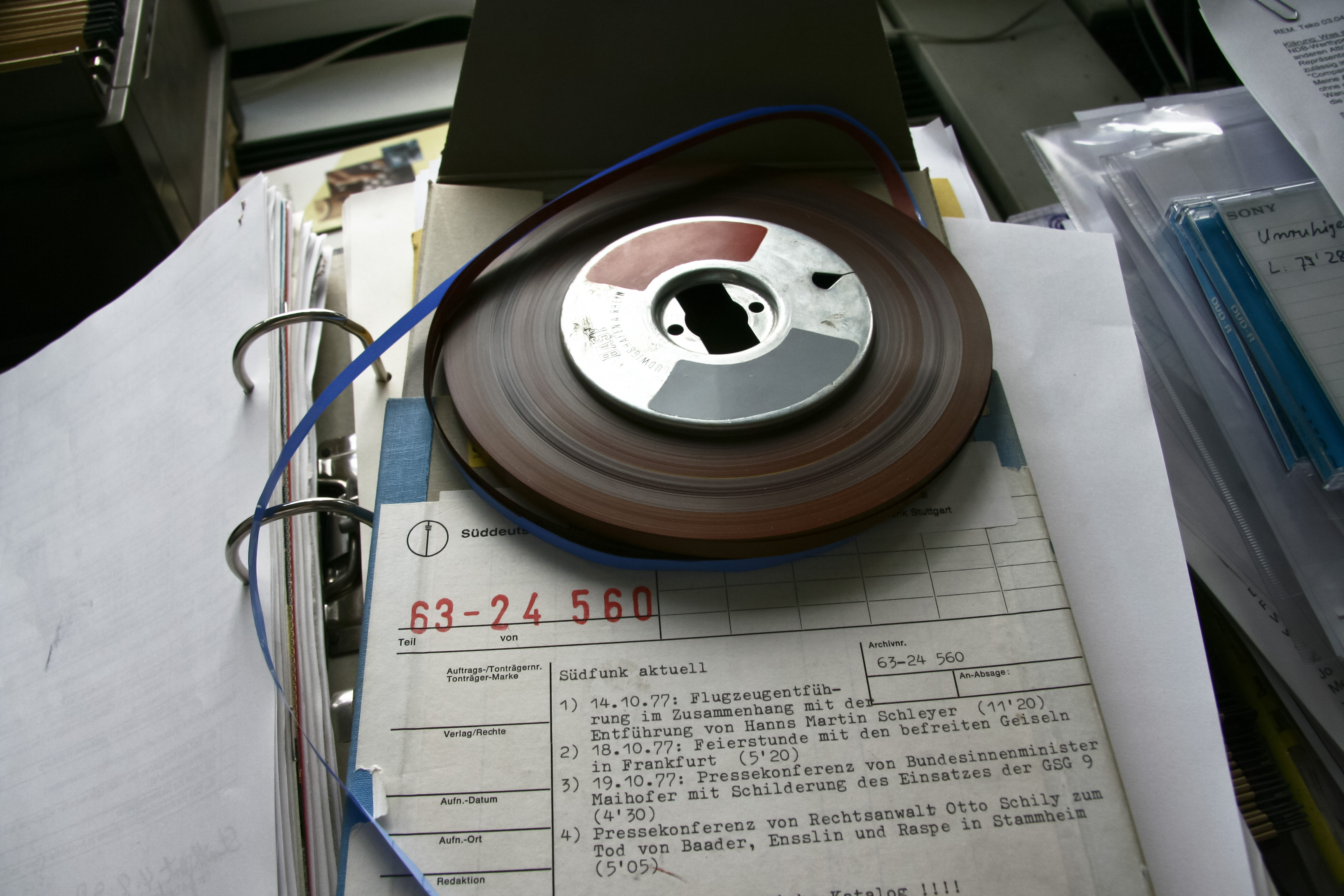 Ein Tonband des Südwestrundfunks (SWR) in Stuttgart enthält archivierte Originaltöne aus dem "Deutschen Herbst" 1977, u.a. mit einem Bericht über die Entführung von Hanns Martin Schleyer und dem Mitschnitt einer Pressekonferenz des Rechtsanwalts Otto Schily zum Tod von Andreas Baader, Gudrun Ensslin und Jan Carl Raspe in Stuttgart/Stammheim.